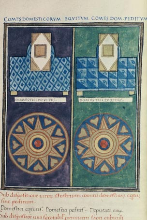 Comes domesticorum equitum, peditum (west) from Notitia dignitatum